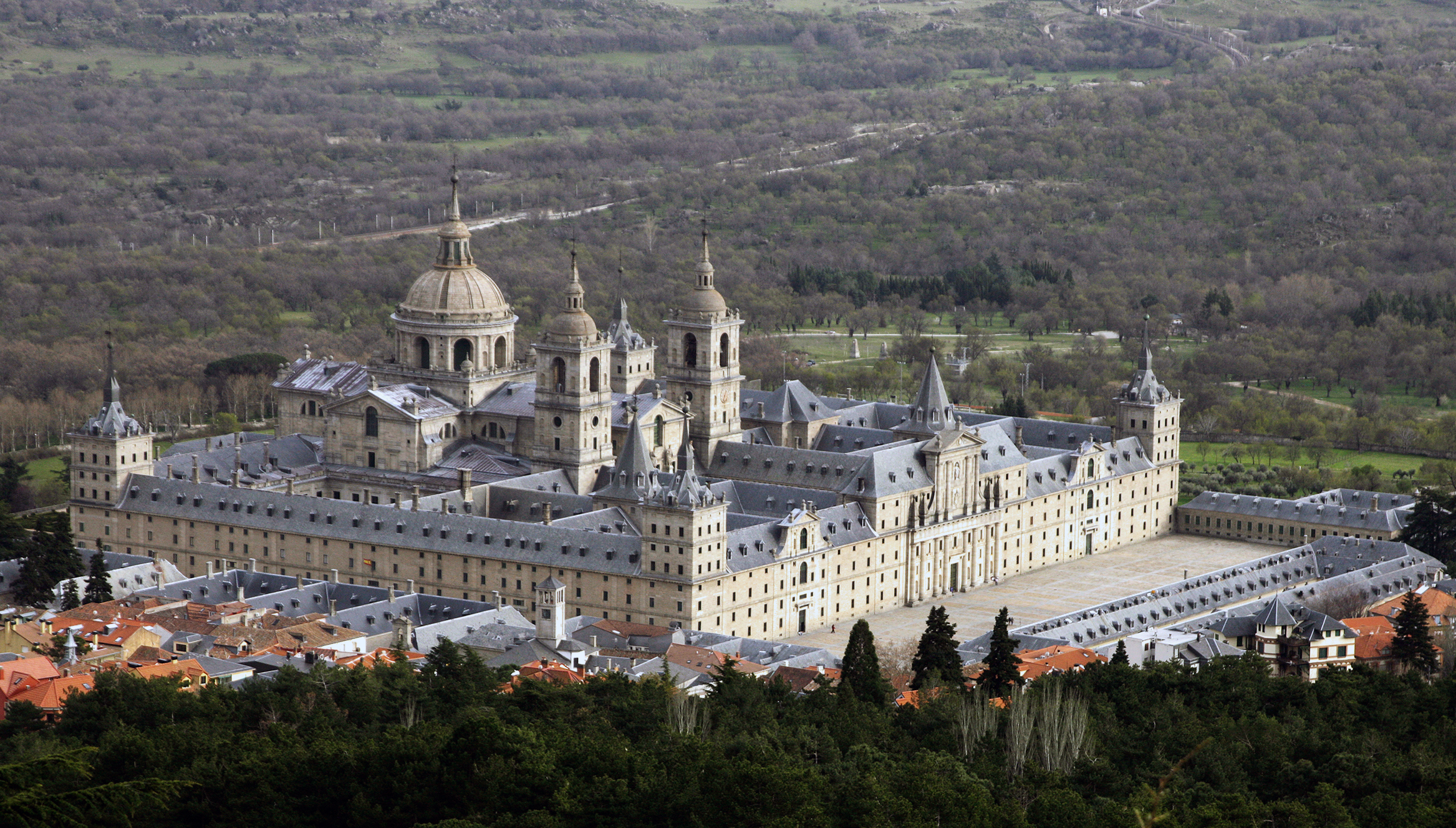 Klosterresidenz El Escorial, Blick auf die gesamte Anlage, Comunidad de Madrid)